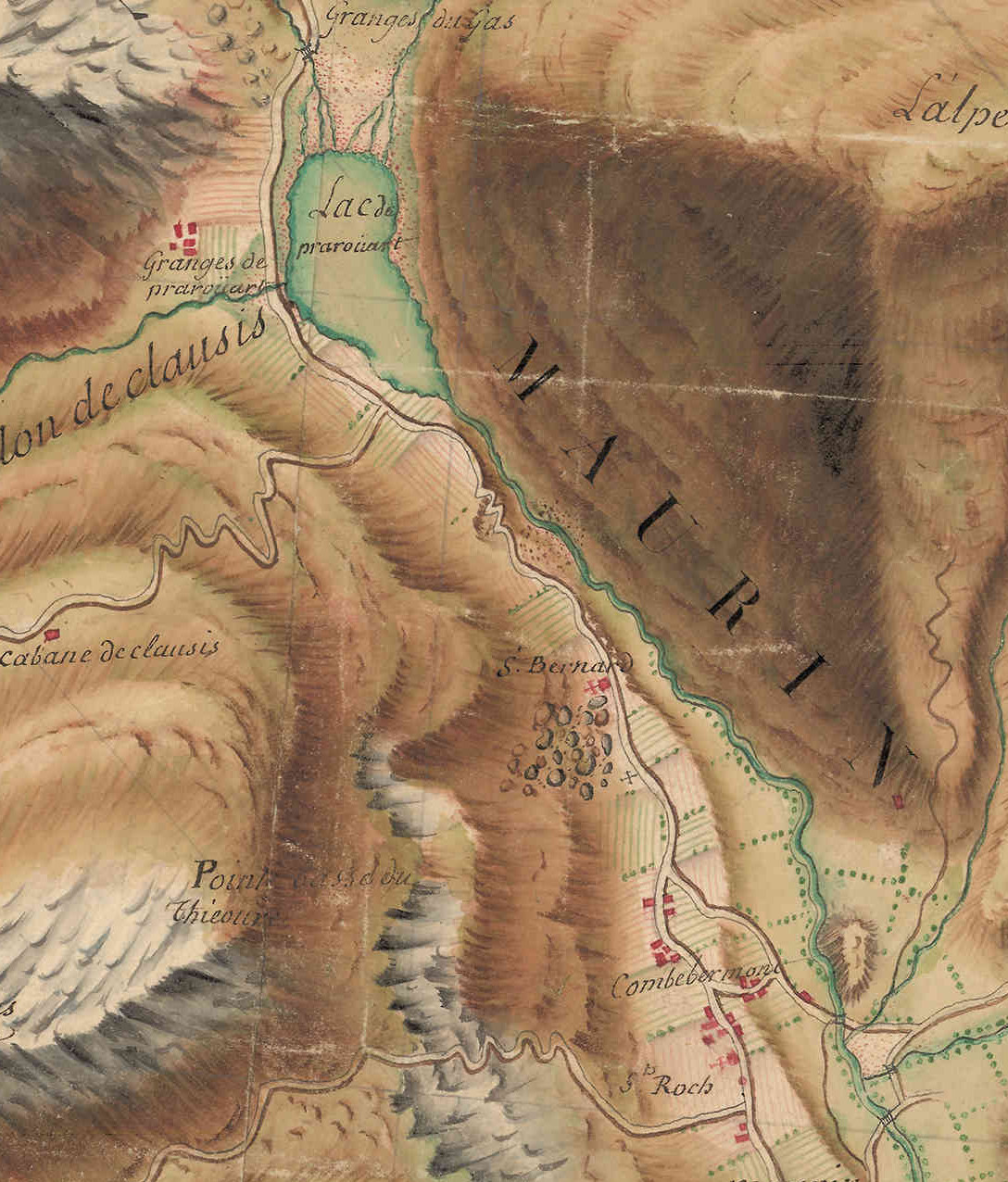 carte de Bourcet numérisé Paris, Nicolas-Alexandre et Olivier-Joseph, Extrait réduc JPG 30% Antoine-H